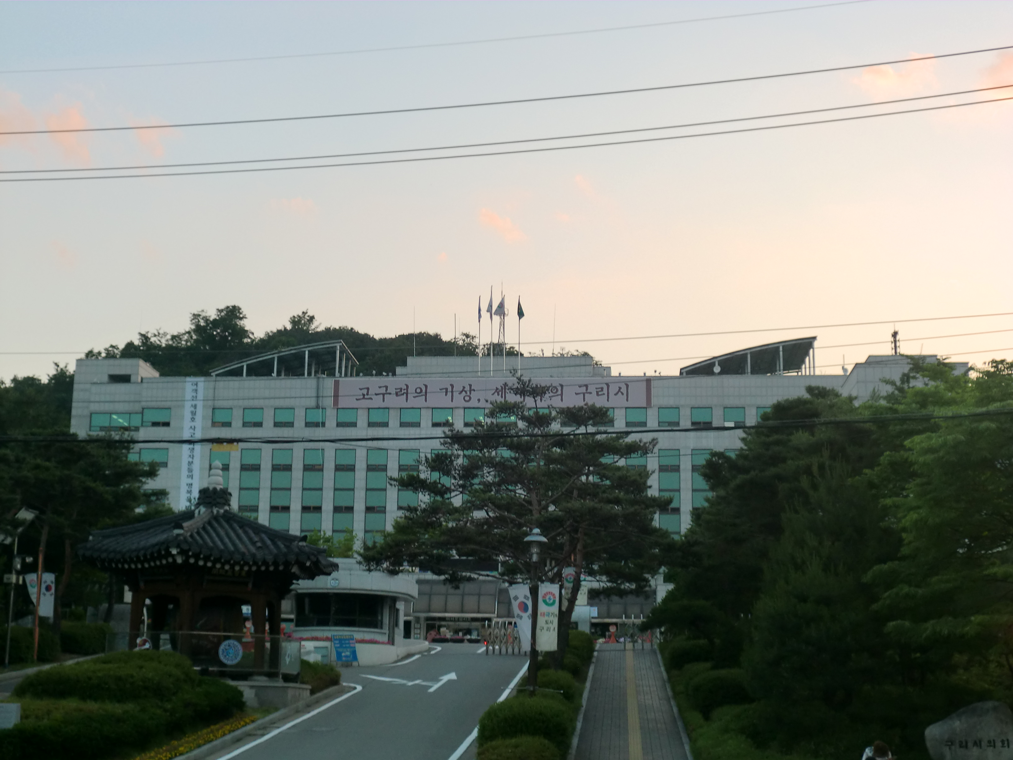 경기도 구리시에 있는 구리시청